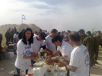 פעילות האגודה למען החייל לחיילי המילואים